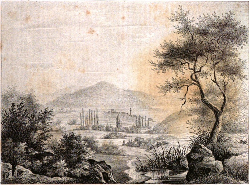 Abbildung „Ruinen von Troja“. Das Bild zeigt rechts den Hügel, der von Jean Baptiste LeChevalier als Standort des antiken Troja vermutet wurde. Im Vordergrund sieht man den jungen Fluss Skamander, in der Mitte das Dorf Vunar-Bachi und im Hintergrund das Ida-Gebirge.